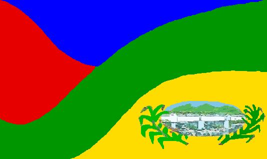 Bandera del municipio Urachiche, estado Yacacuy, Venezuela